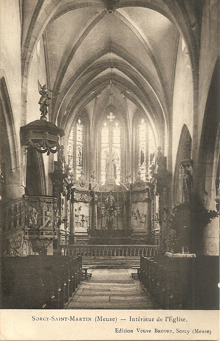 Sorcy-saint-Martin (Meuse) - Intérieur de l'église - Carte Postale Ancienne Noir et Blanc avant 1916